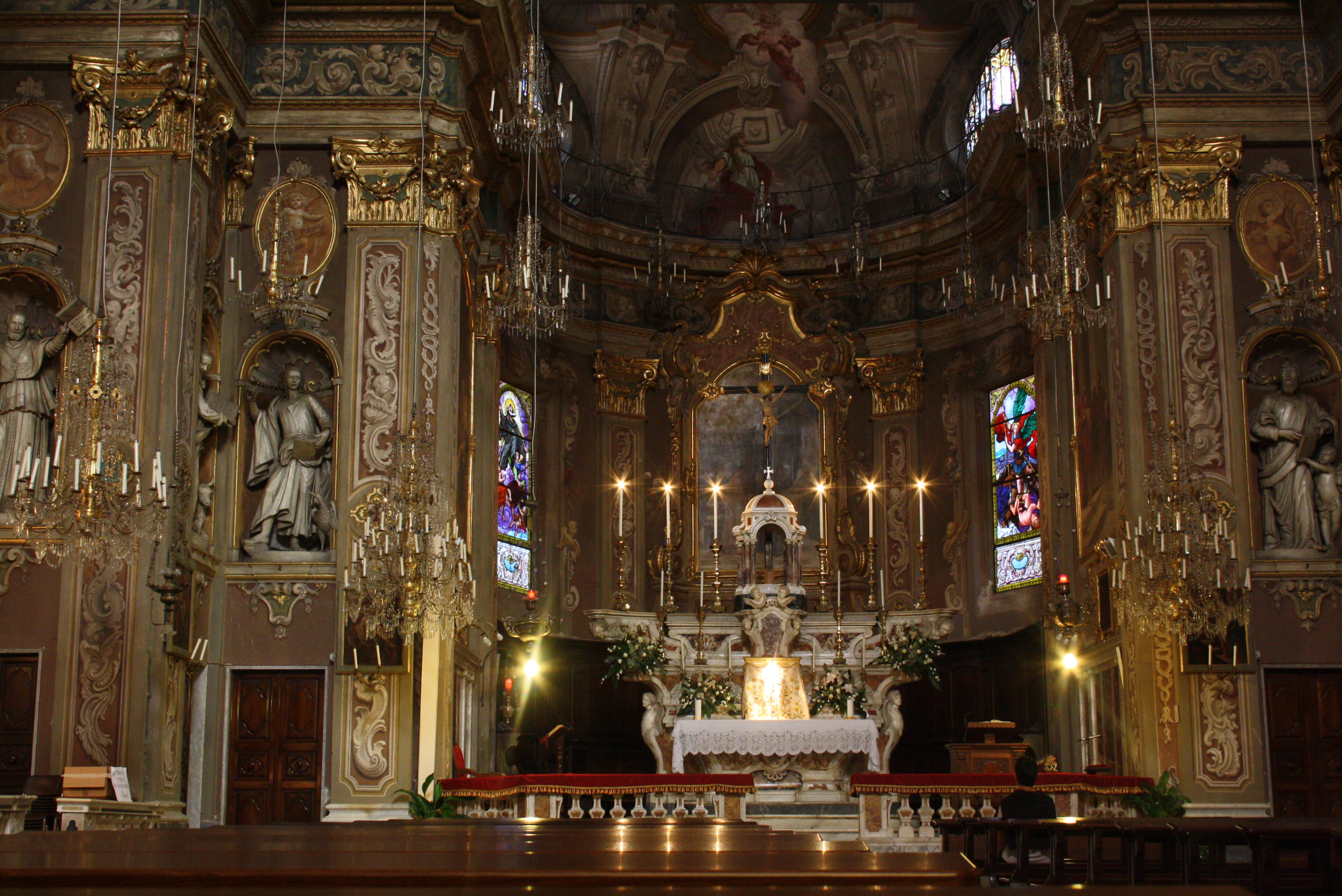 Innenraum der Kirche Unbefleckte Empfängnis in Campo Ligure - Italien.